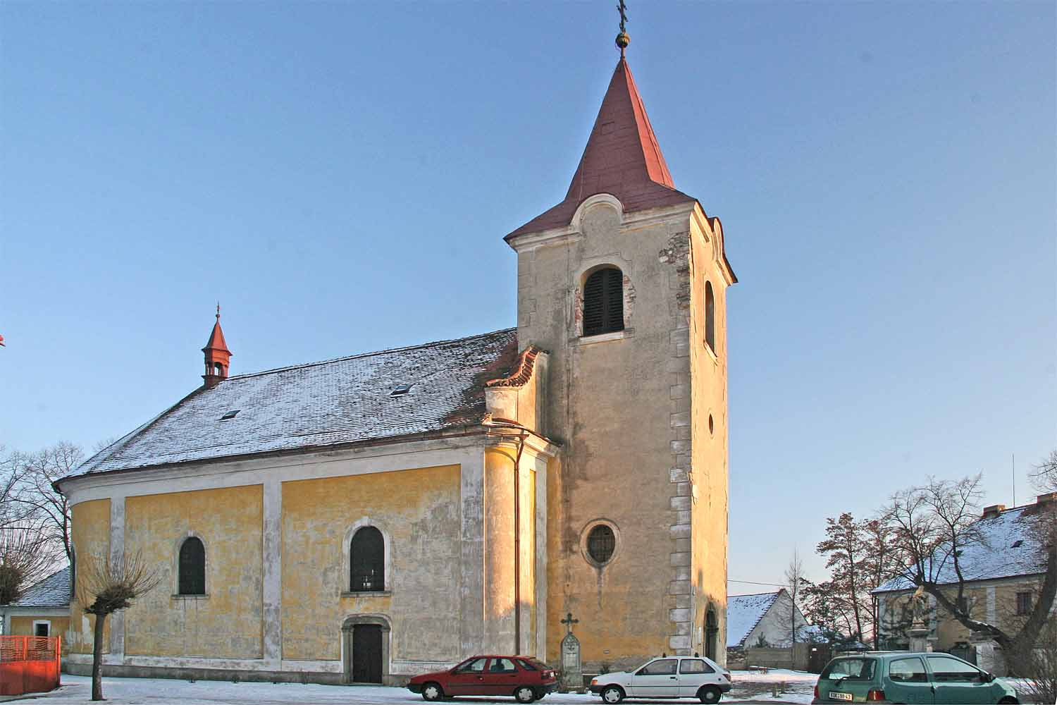 Kostel Sv. Jana Křtitele v Týnci nad Labem